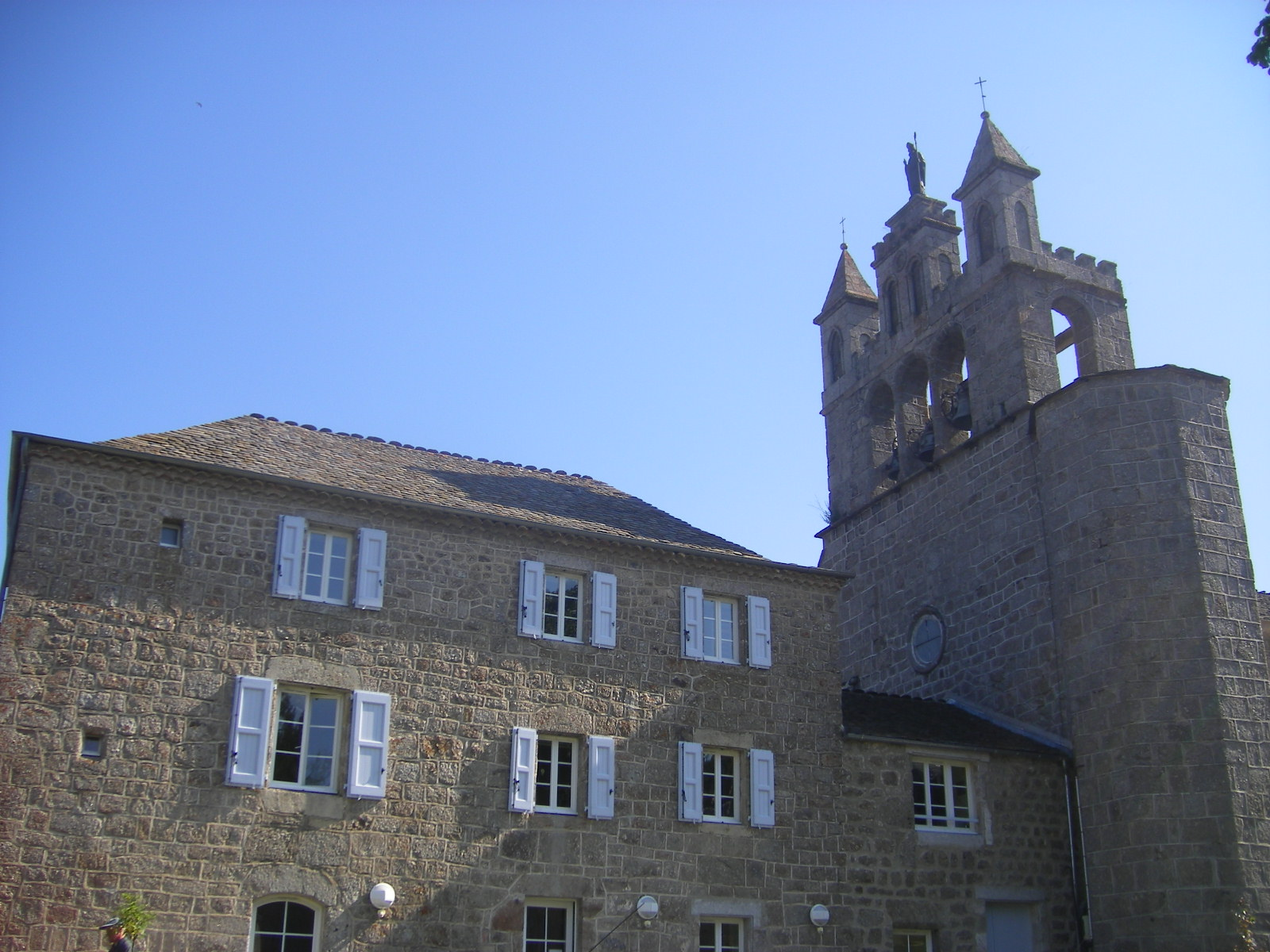 Chaudeyrac